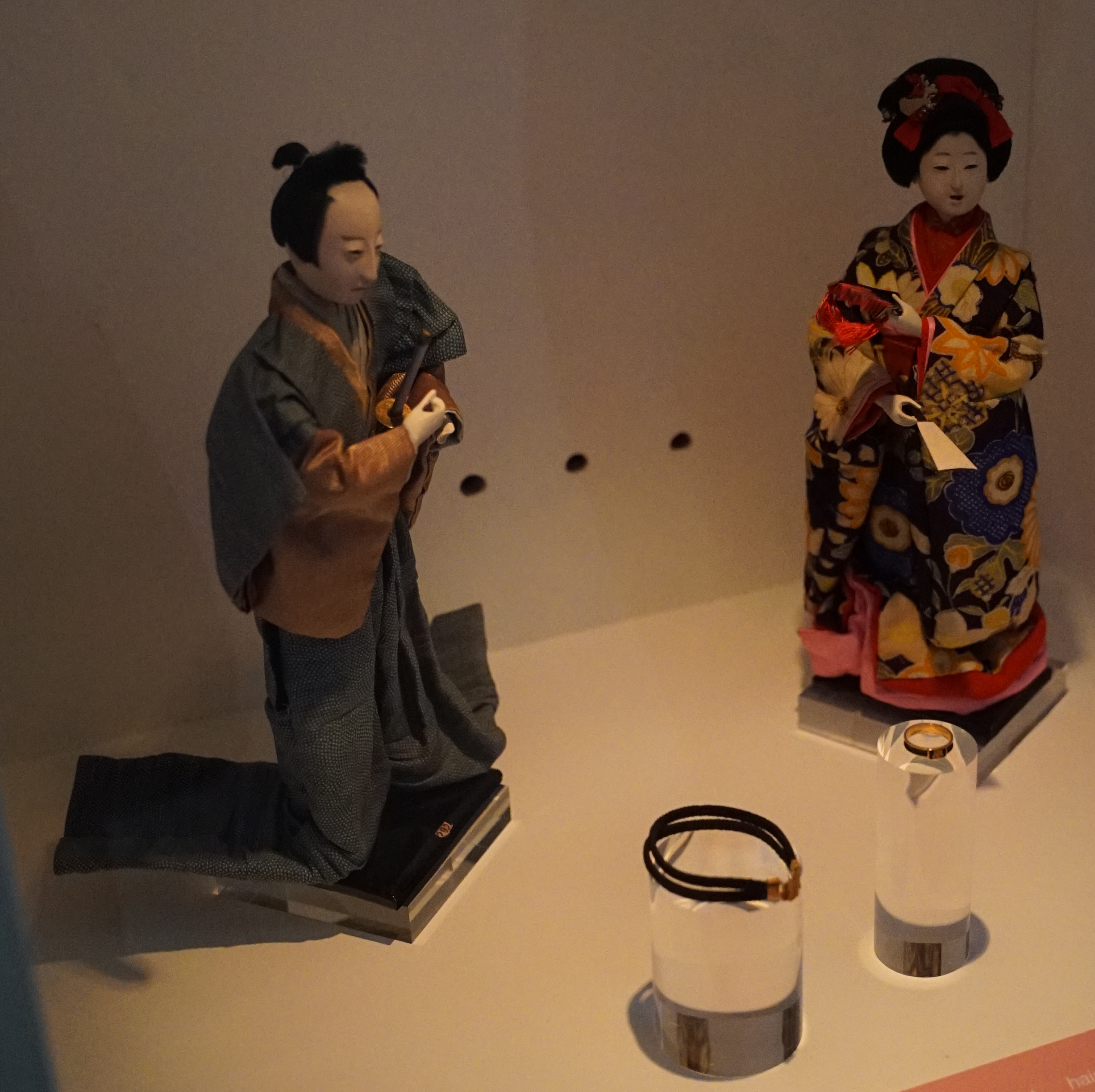 à l'aquarium de Nancy.